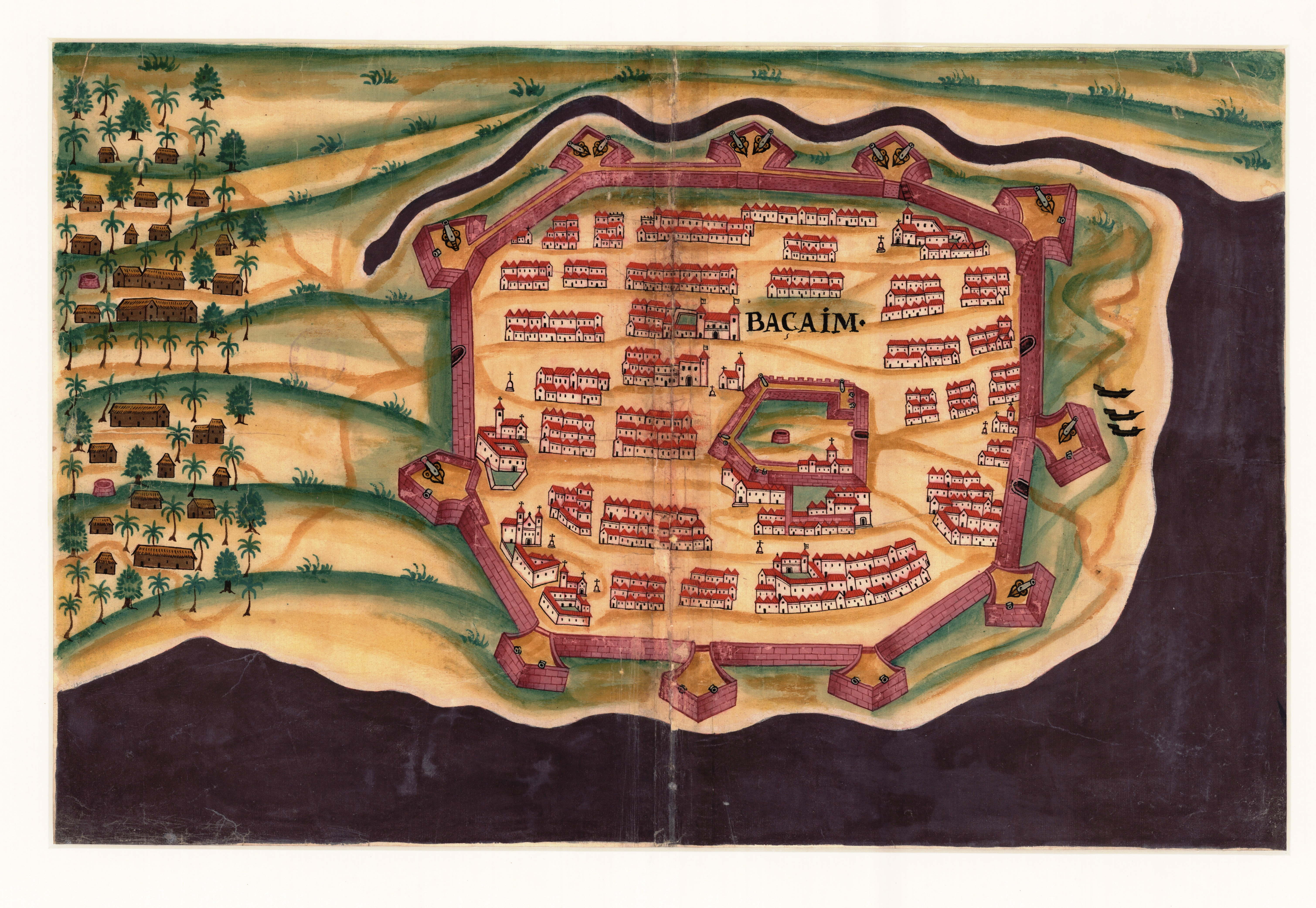 Planta da Fortaleza de Baçaim in BOCARRO, António. Livro das Plantas de todas as fortalezas, cidades e povoaçoens do Estado da Índia Oriental. 1635.